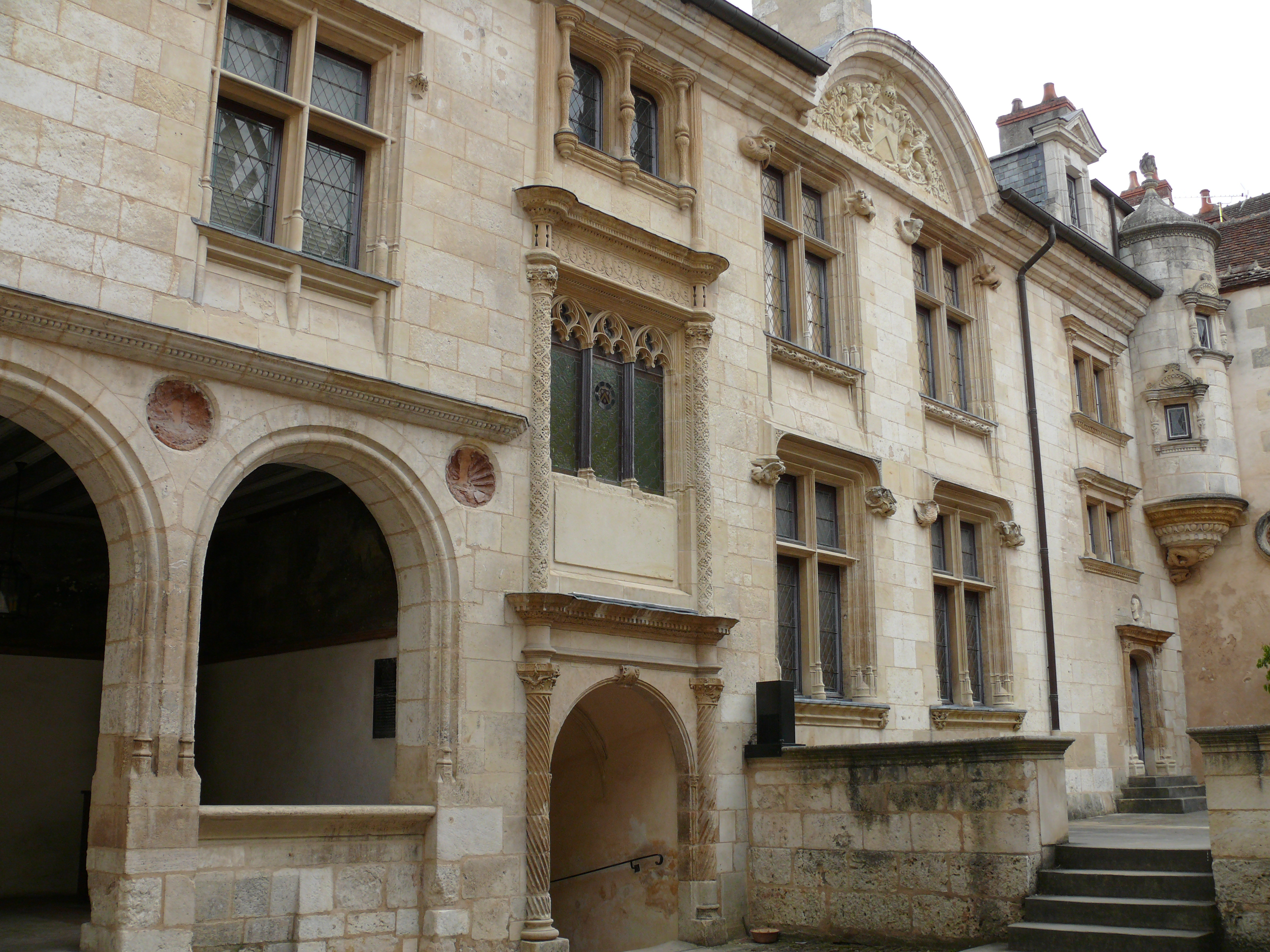 Bourges - Hôtel Lallemant - Façade sur cour